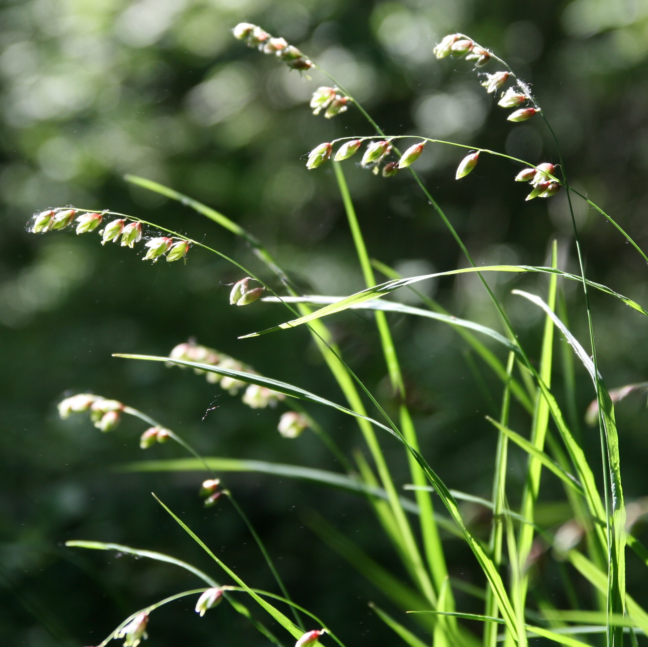 Nuokkuhelmikkä, Melica nutans